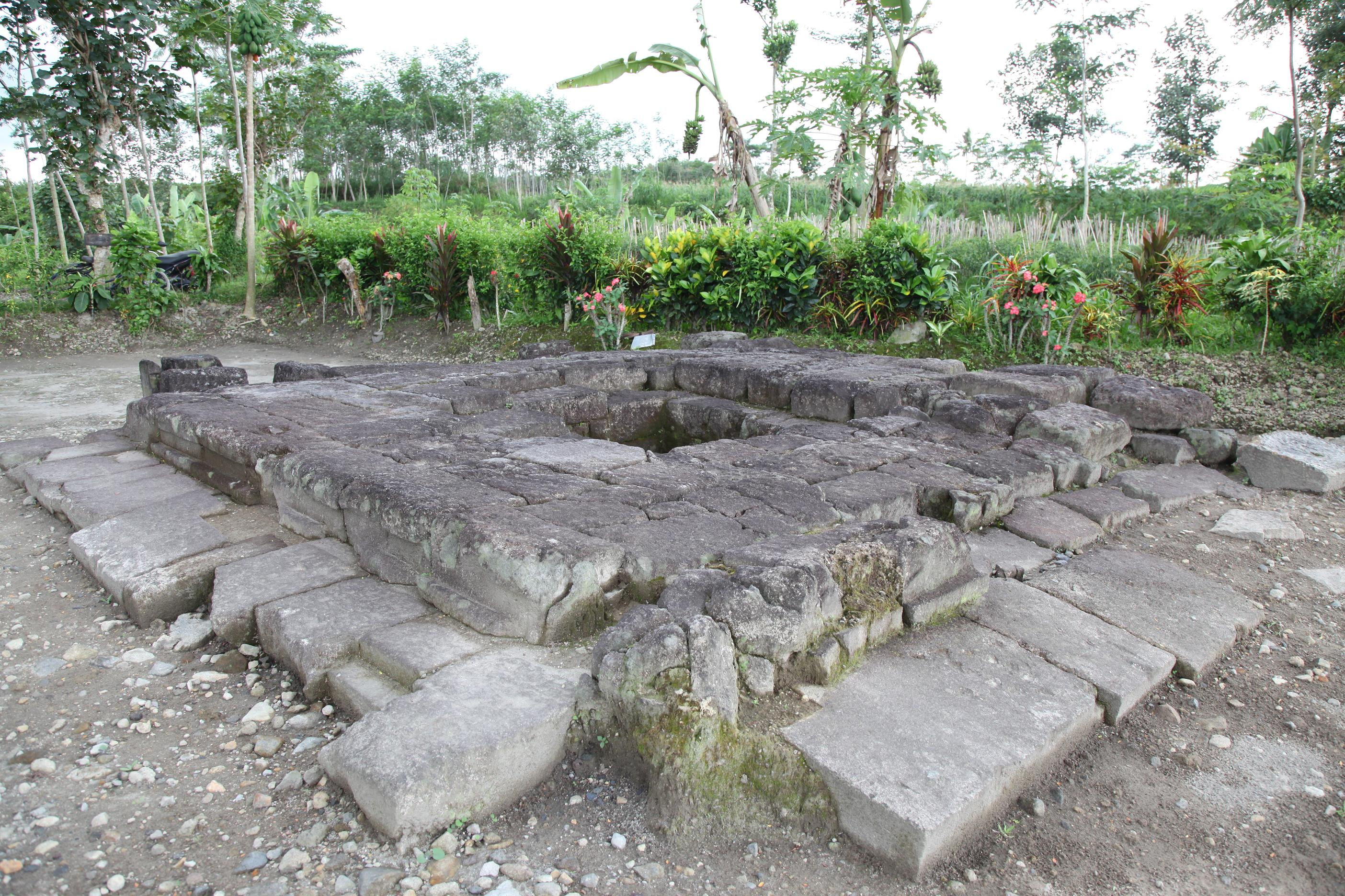 Situs Sumberagung (Sumberagung Temple describe)